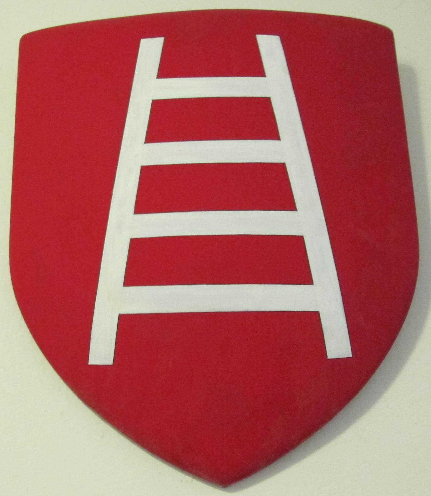 Casa di dante, fi, stemma della scala